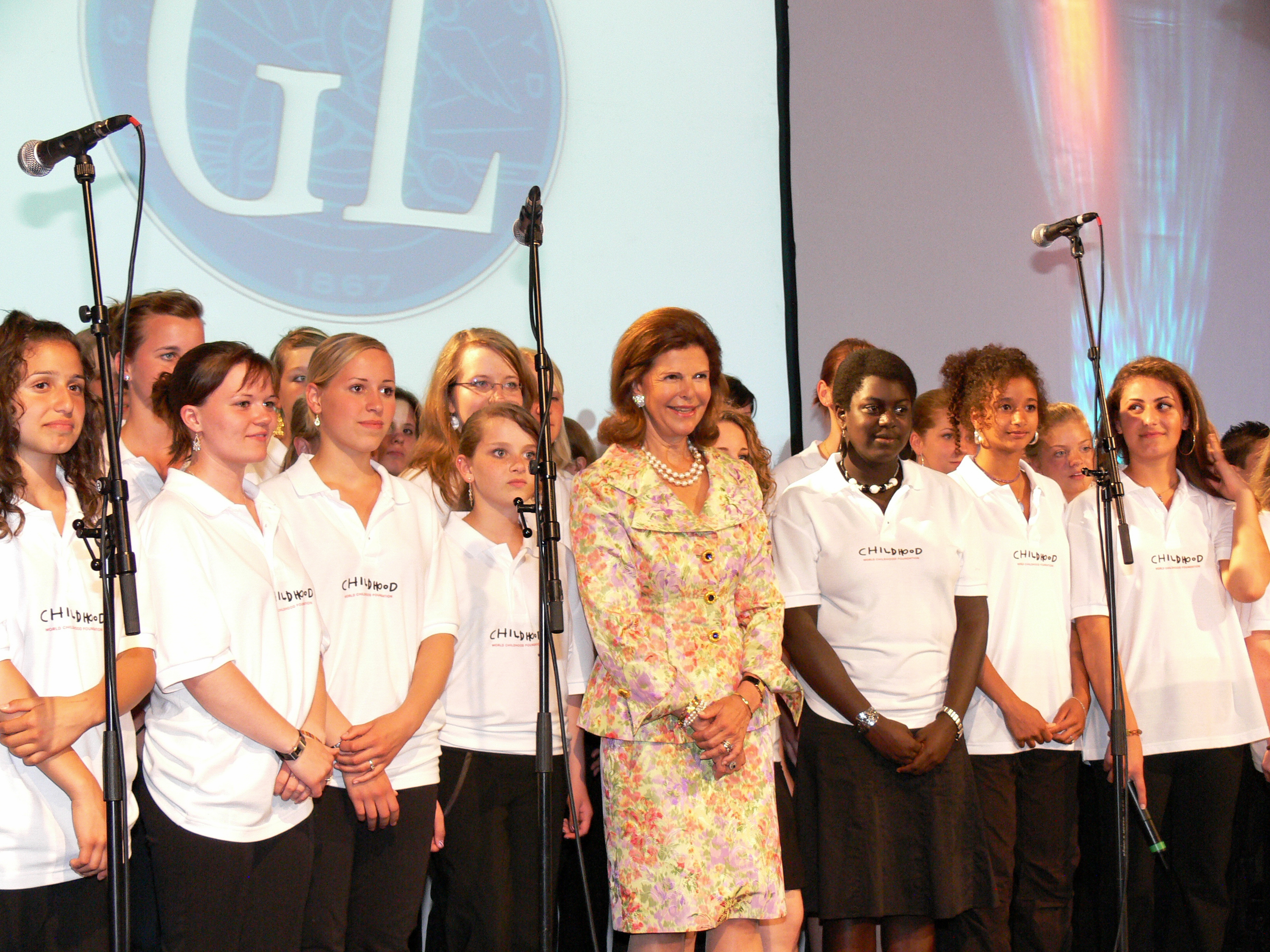 Gospel Train Hamburg und Königin Silvia von Schweden in Kiel.